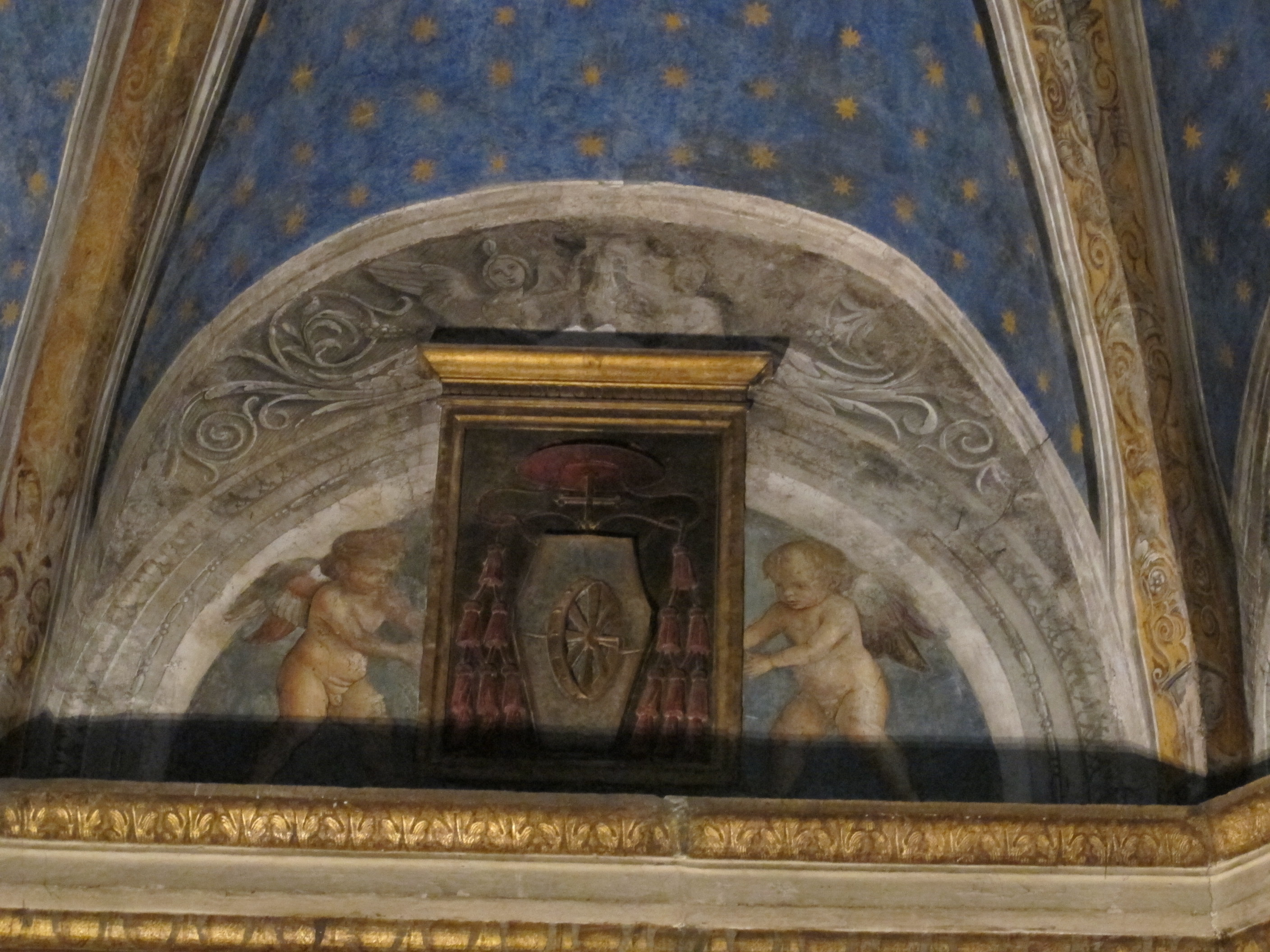 Cappella costa, lunette di aiuti del pinturicchio